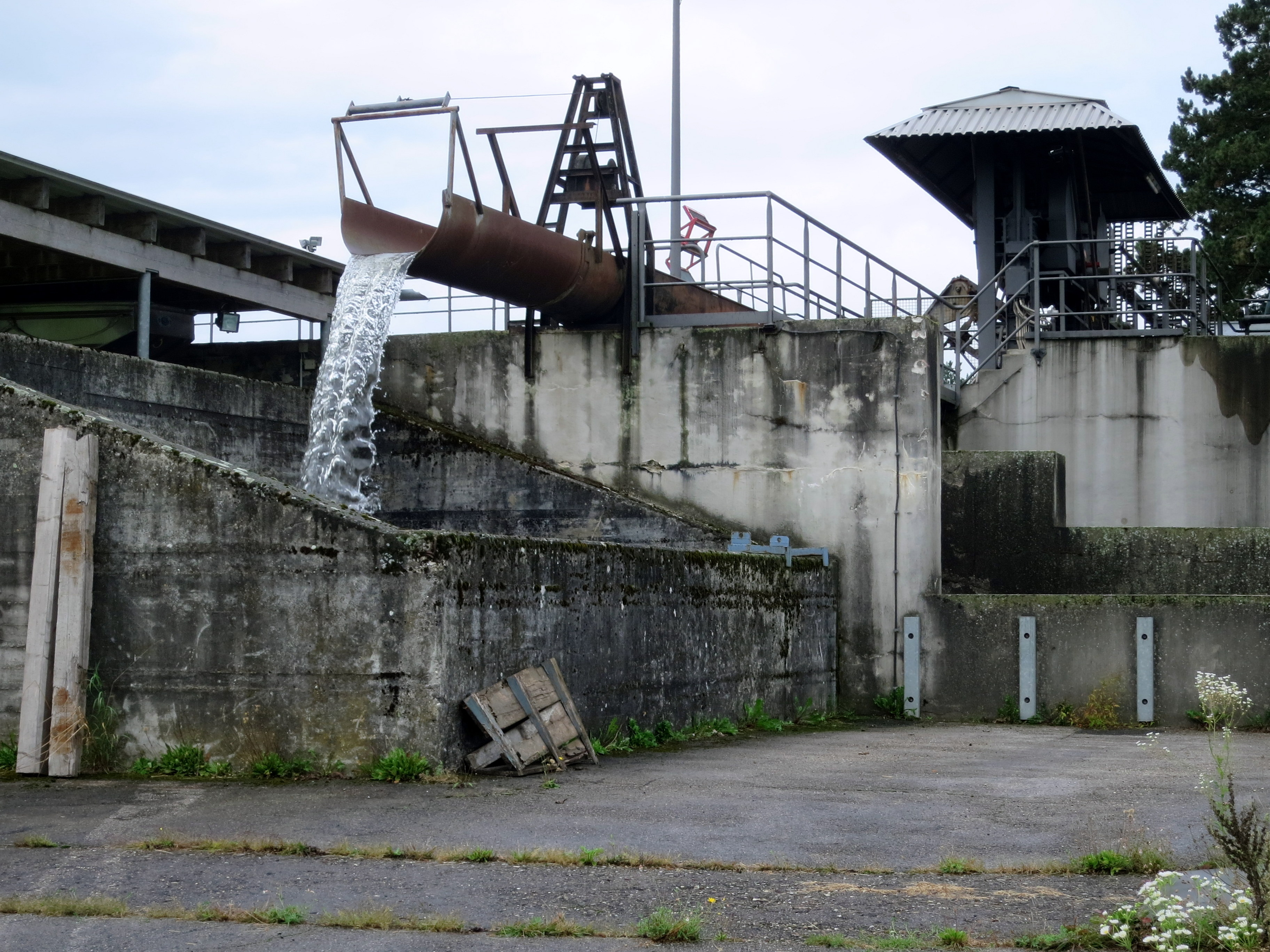 Ein über 100 Jahre altes Wasserkraftwerk, das in Privatbesitz ist und saubere Energie liefert.